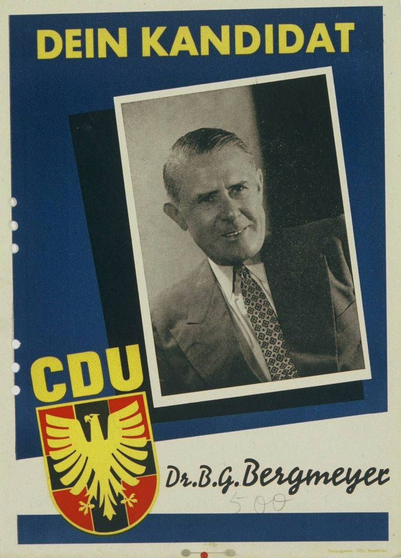 Dein Kandidat Dr. B.G.Bergmeyer Abbildung: Porträtfoto Plakatart: Kandidaten-/Personenplakat mit Porträt Auftraggeber: CDU Westfalen Objekt-Signatur: 10-001: 742 Bestand: Plakate zu Bundestagswahlen (10-001) GliederungBestand10-18: Plakate zu Bundestagswahlen (10-001) » Die 3. Bundestagswahl am 15. September 1957 » CDU » Mit Porträtfoto Lizenz: KAS/ACDP 10-001: 742 CC-BY-SA 3.0 DE